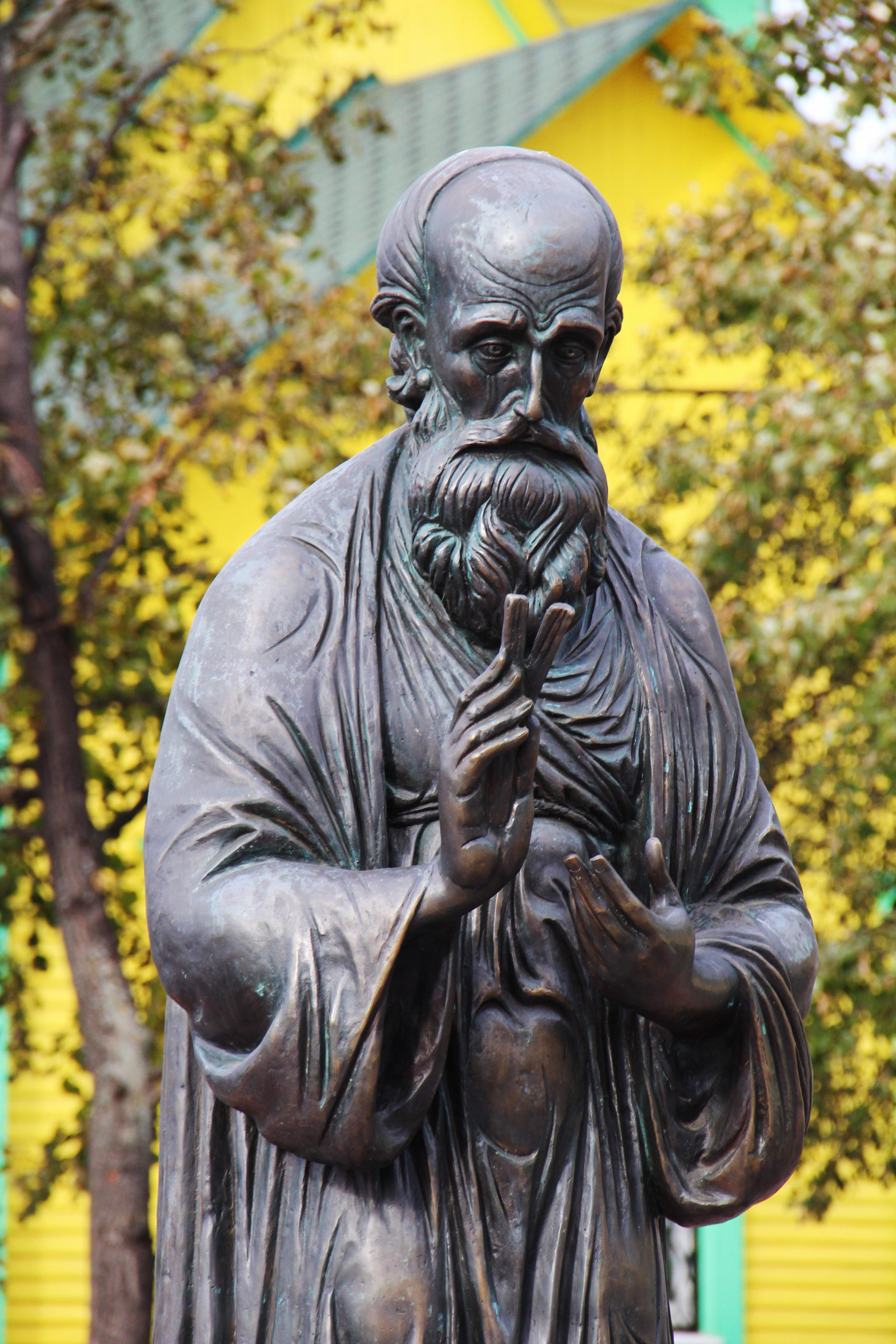 Андрей Симбирский